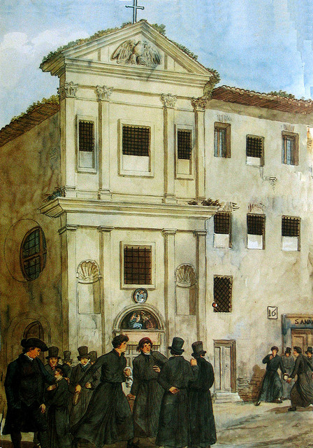 Chiesa distrutta di Sant'Anna dei Falegnami